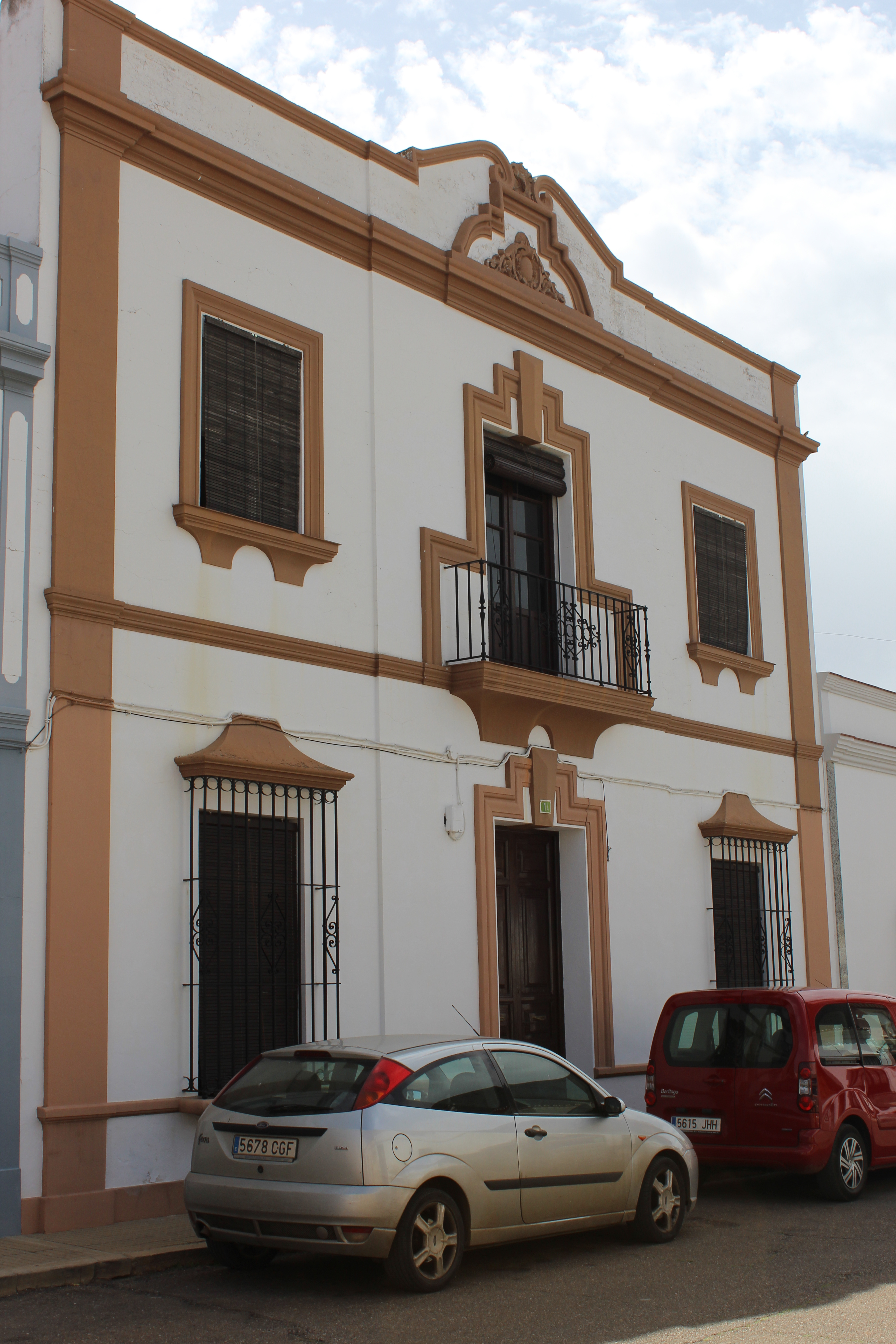 Ayuntamiento Solana de los Barros